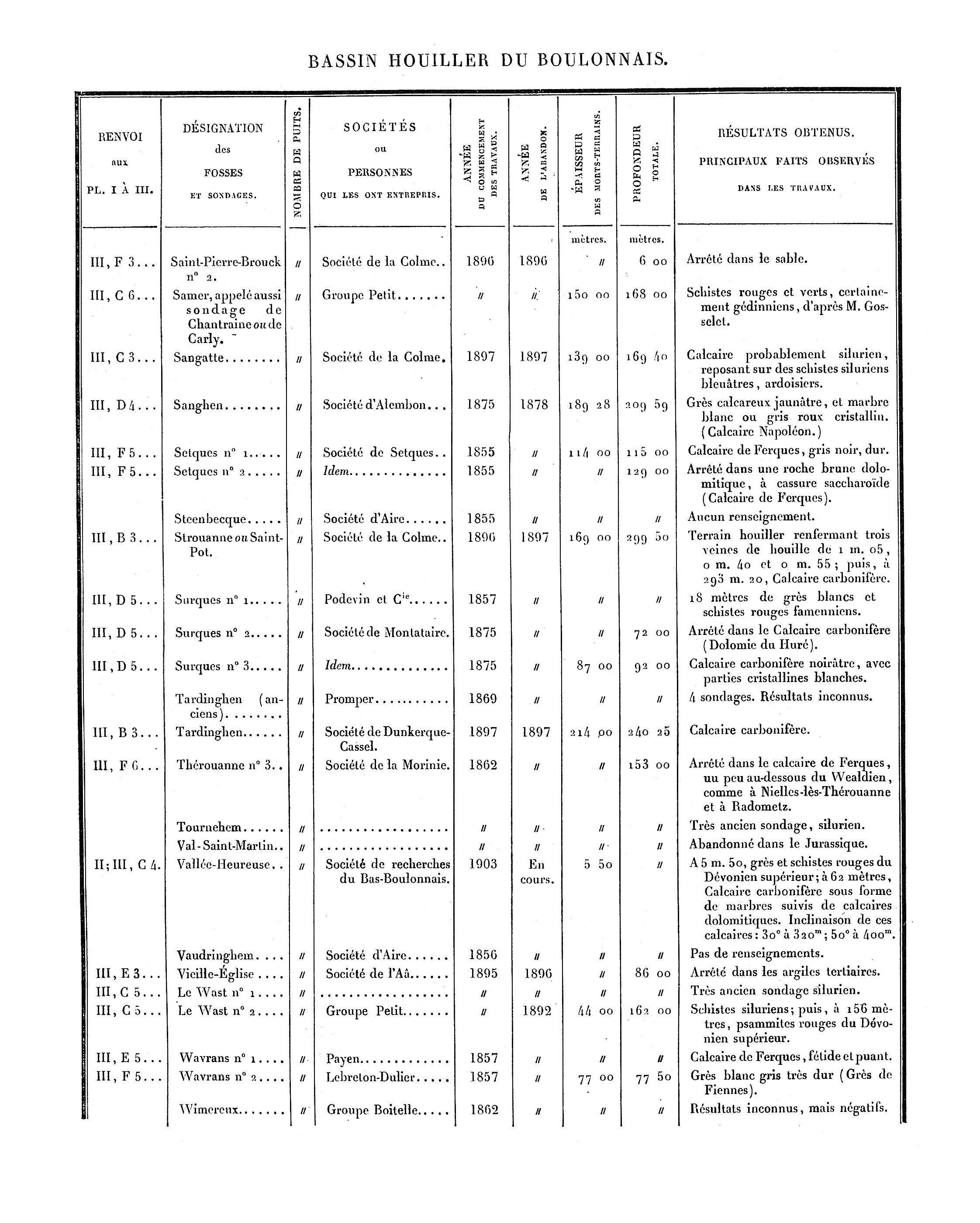 Liste des puits de mine et des sondages. Mines du Boulonnais. Document extrait de Étude des Gîtes Minéraux de la France. Topographie Souterraine du Bassin Houiller du Boulonnais ou Bassin d'Hardinghen, par A. Olry, ingénieur en chef des Mines. Chapitre IX, pages 172 à 189.